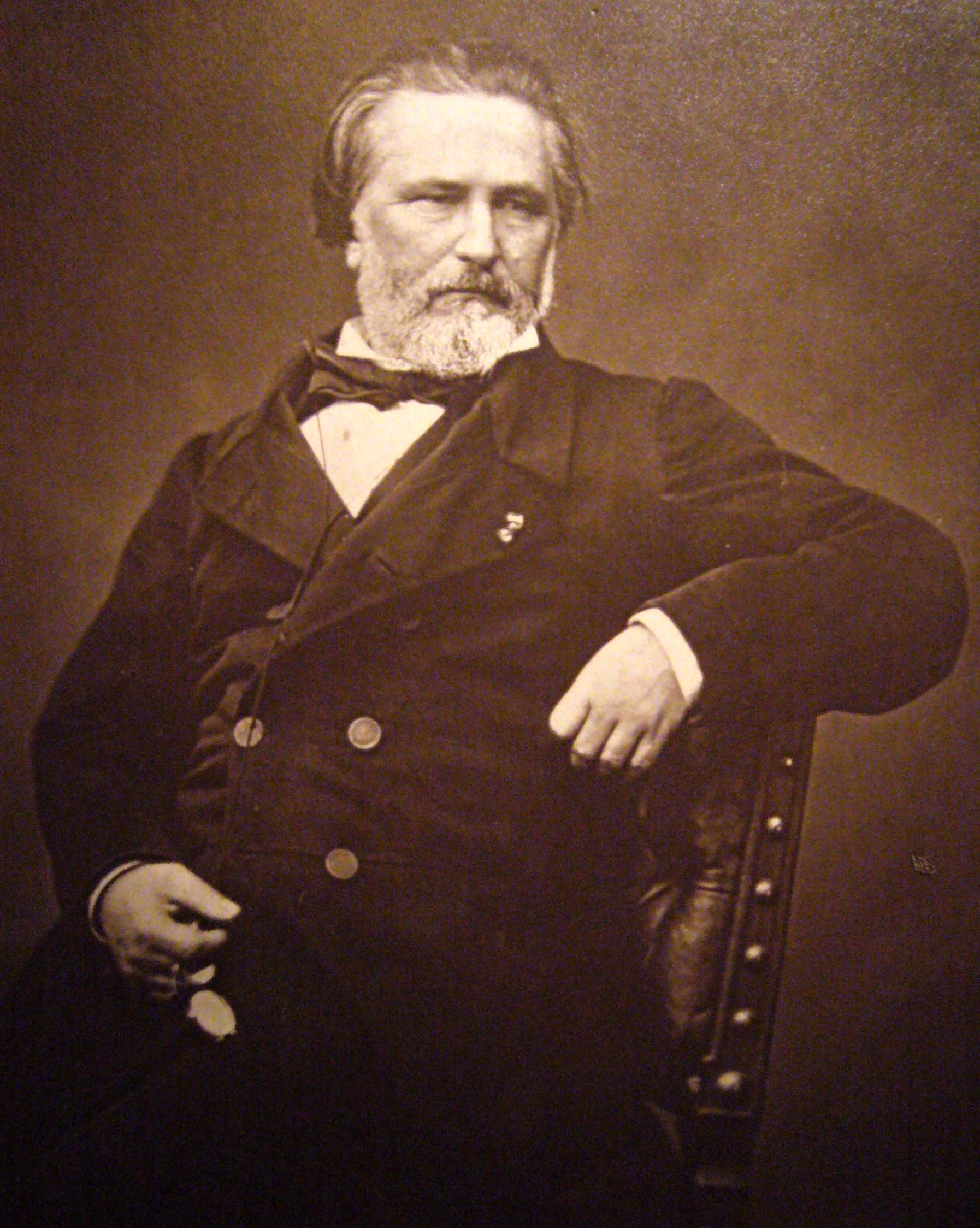 Jules Duval tiré de son livre "l'algérie et les colonies françaises" publié en 1877 chez Guillaumin (Paris), mention : Pierre Petit Photographe